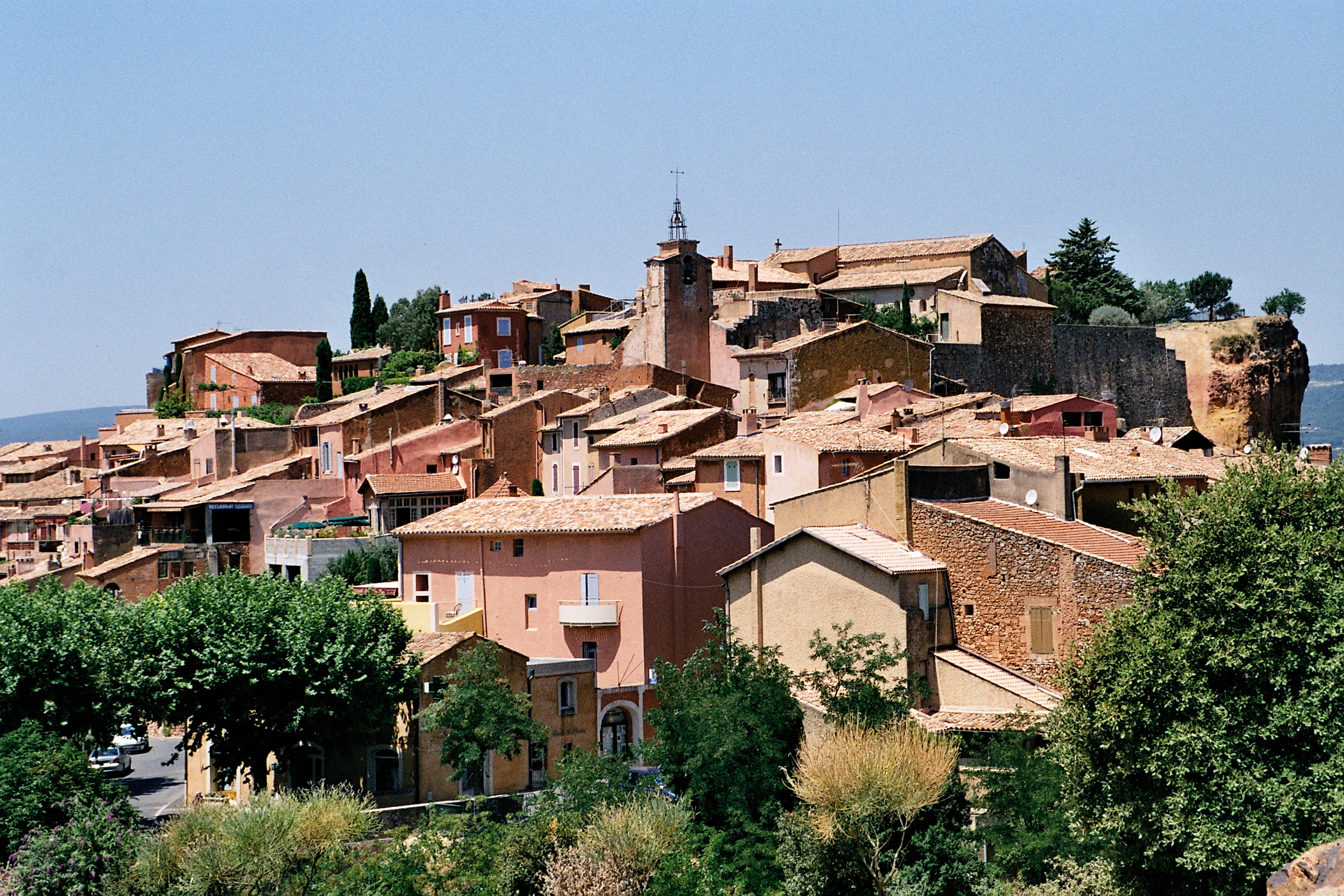 Roussillon dans le Vaucluse